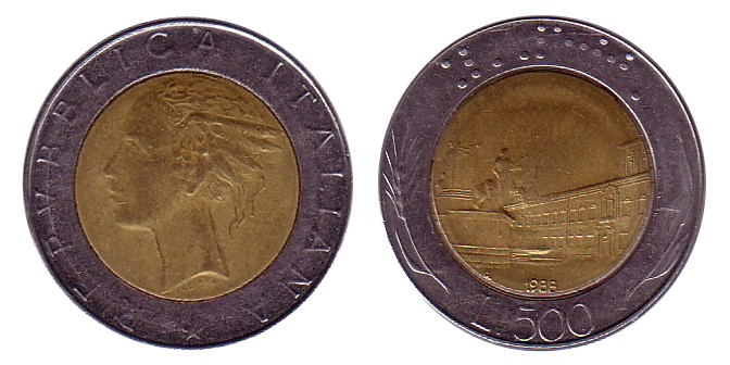 Italia; lire 500